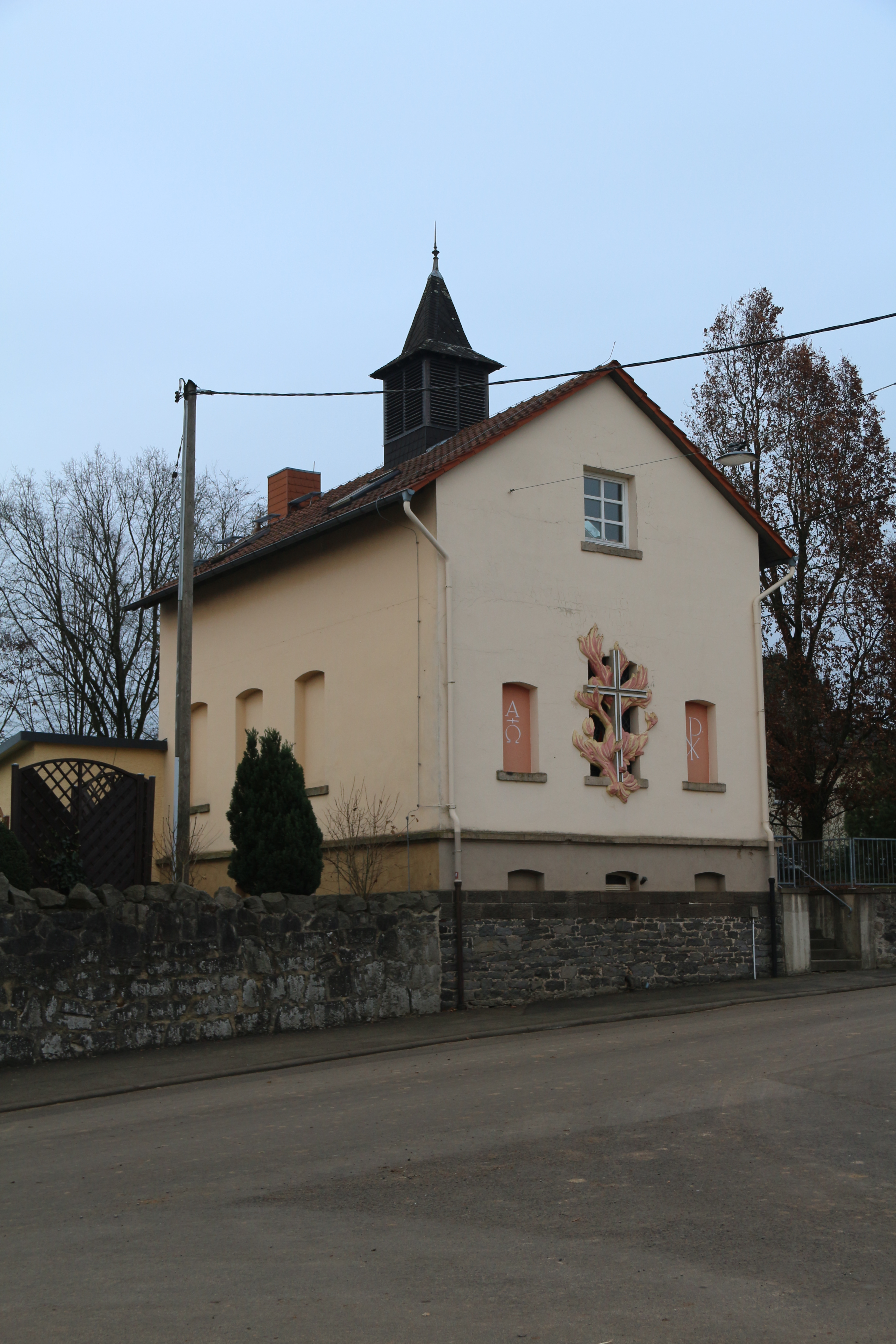 Kirche